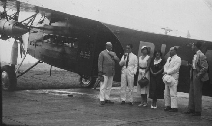 Foto. Passagiers naast de Fokker F-XII van de KNILM dat hen van het vliegveld Andir bij Bandoeng naar Singapore zal brengen